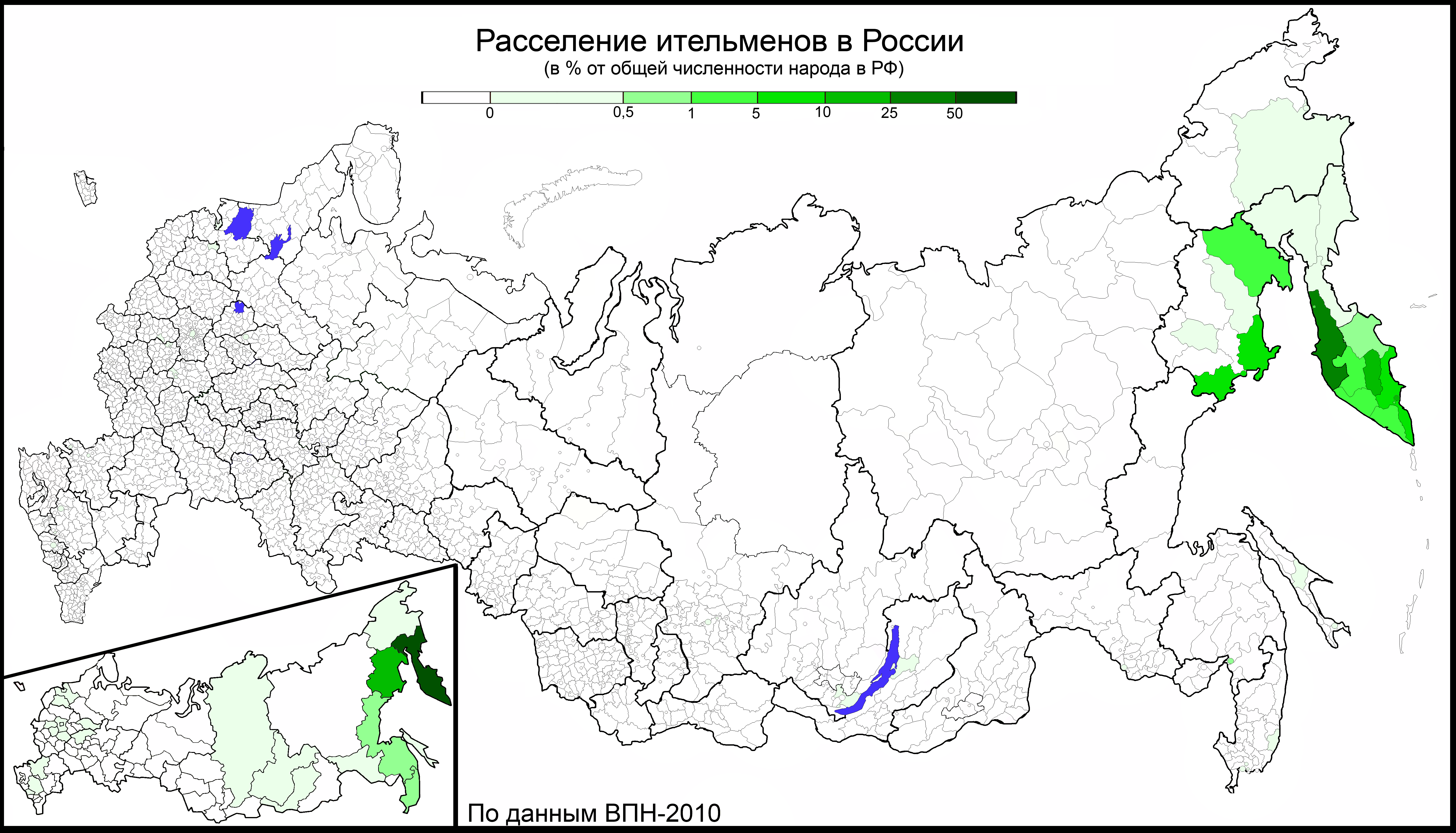 Расселение ительменов в России по муниципальным районам и городским округам в % от общей численности этого народа в РФ. По переписи 2010 года